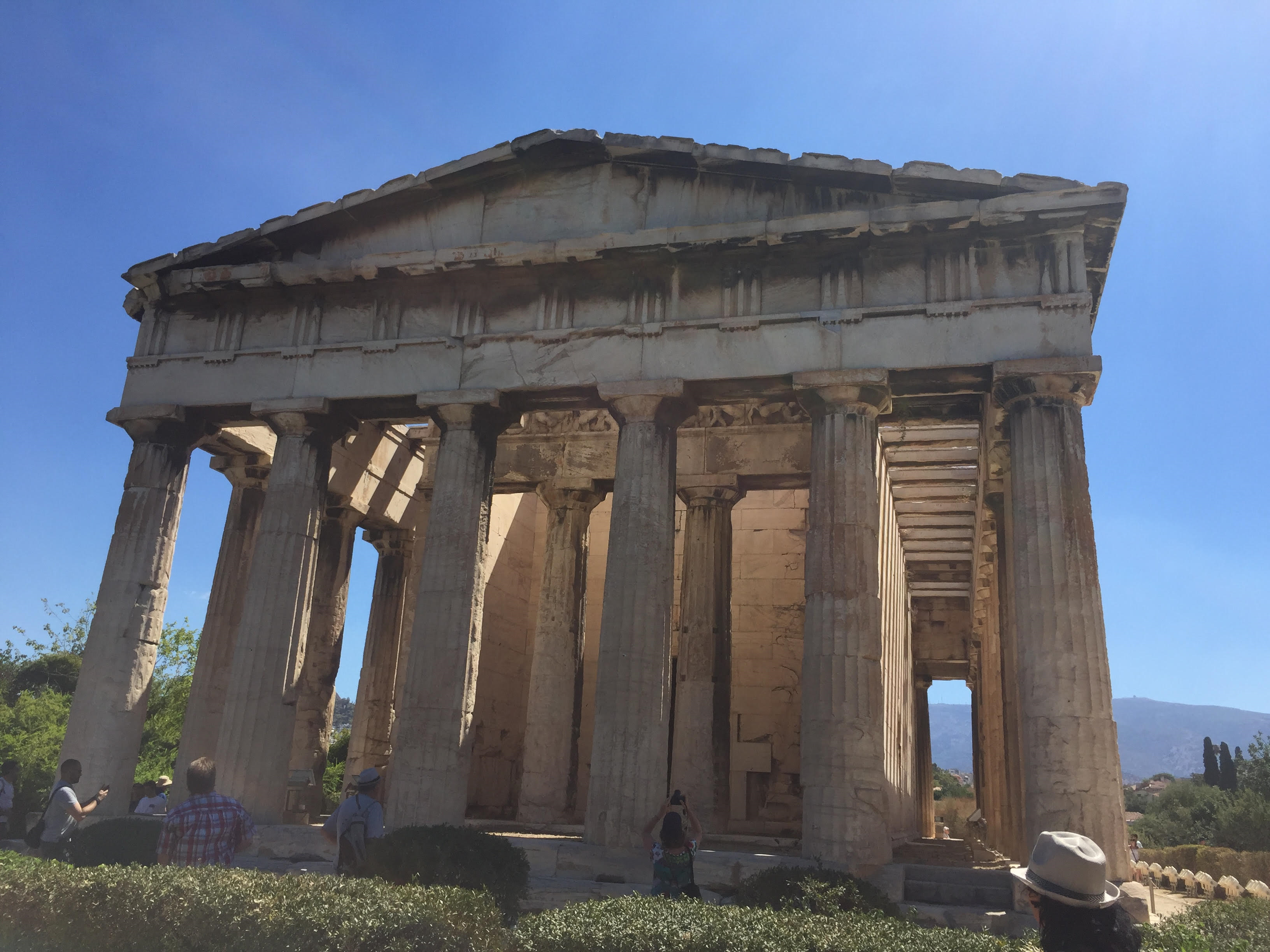 «άγνωστο»